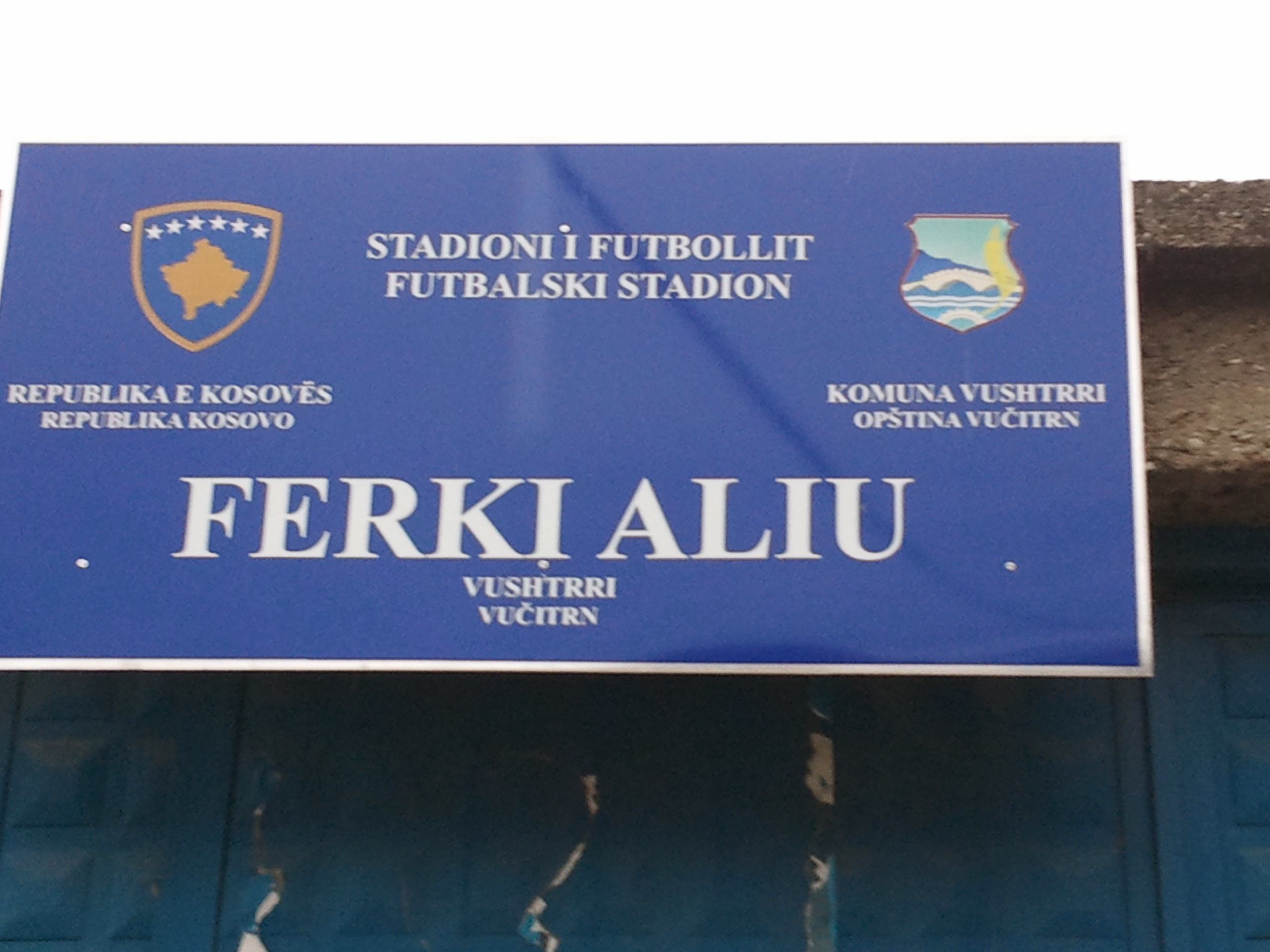 Eingangsschild im FERKI Aliu-Stadion in Vushtrri